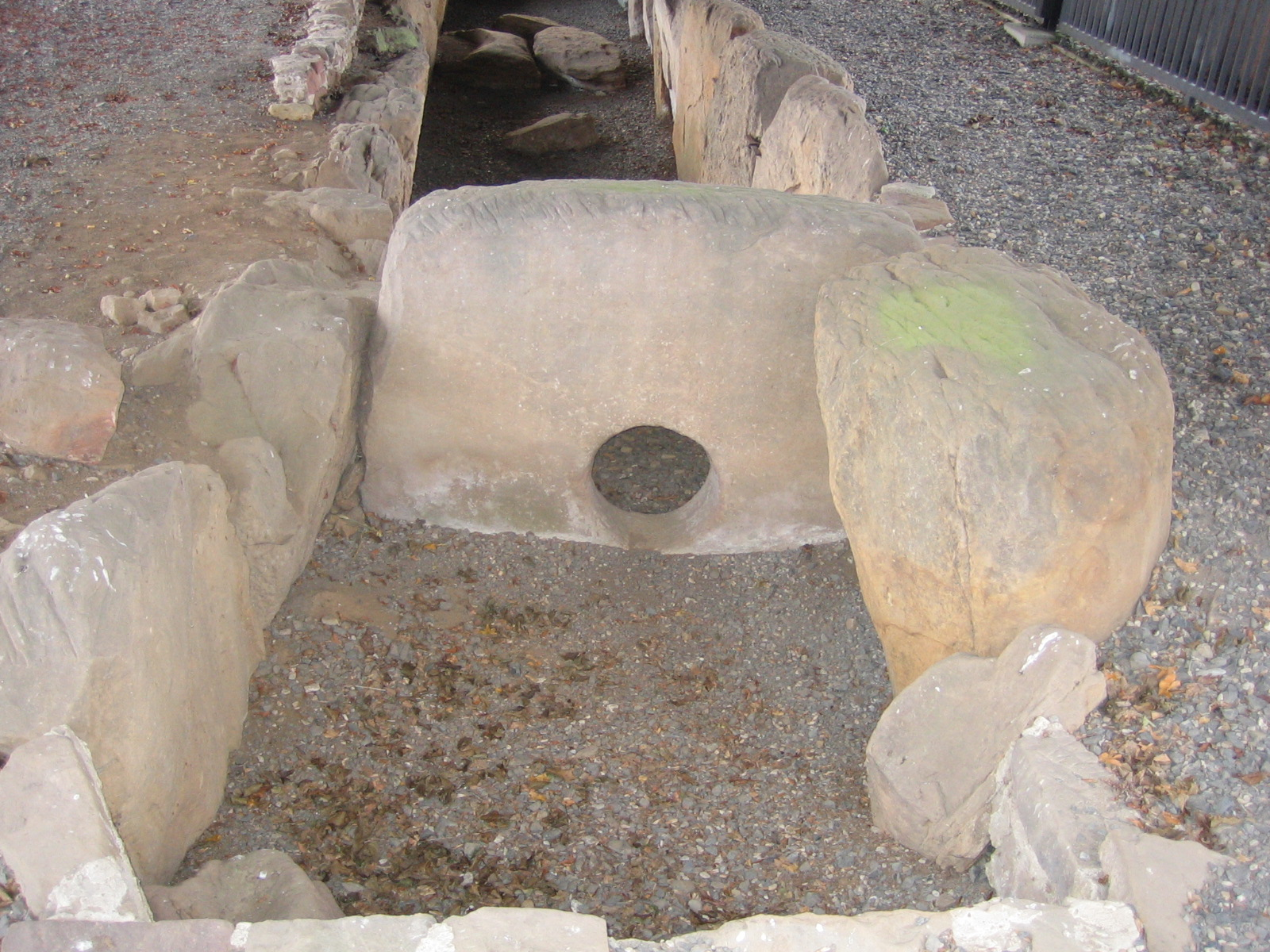 Steinkammergrab in Züschen (Ortsteil von Fritzlar, Nordhessen) aus dem 3. Jahrtausend v.Chr, Naturdenkmal